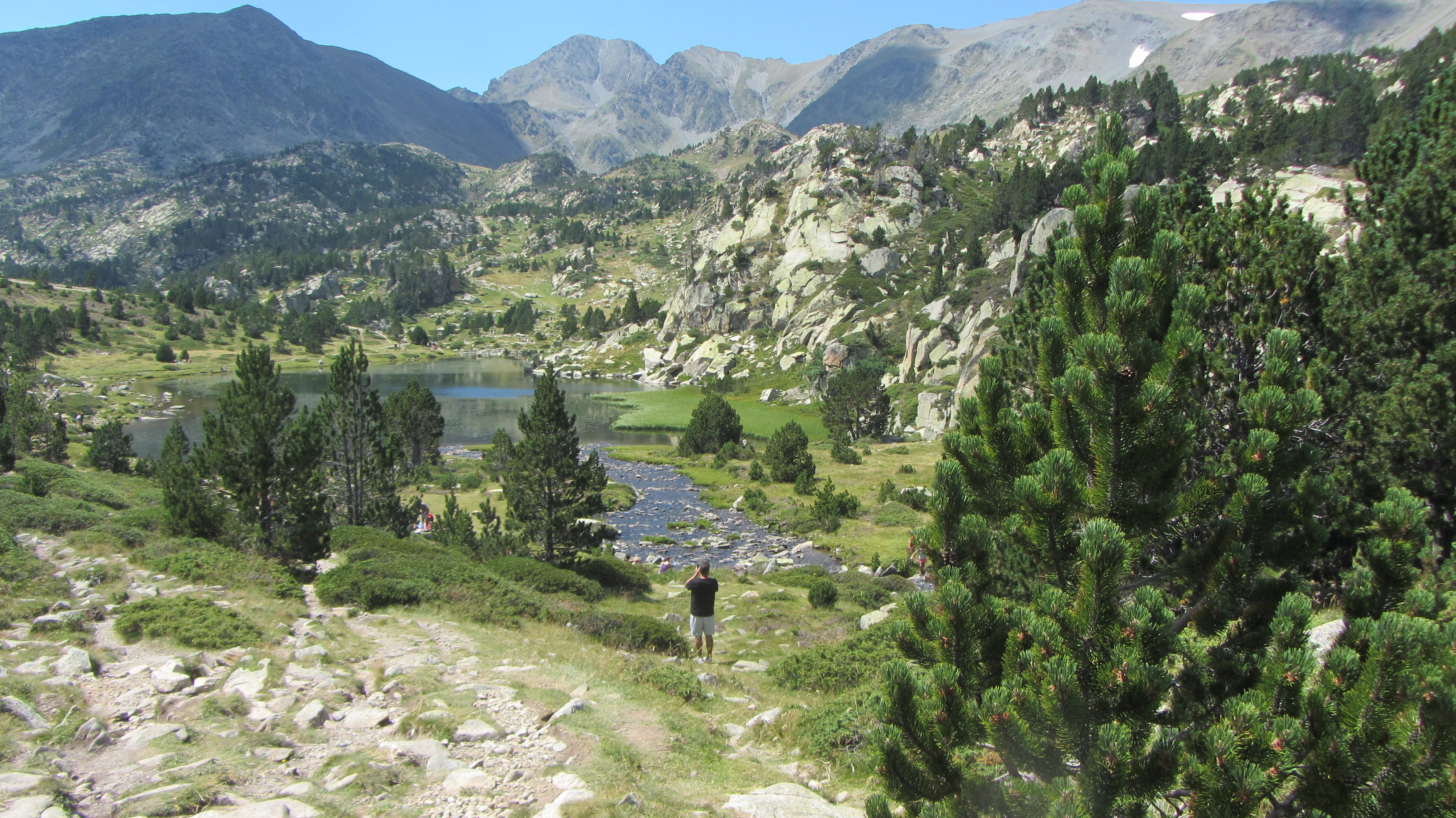 étang de Bailleul